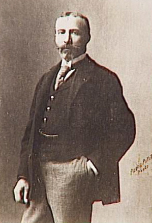 ArtistPhoto réalisée par Pierre Petit (1831-1909)TitleJulien Le Blant, peintre (1851-1936)Current location Musée d'Orsay Native nameMusée d'OrsayLocationParisCoordinates48° 51′ 36″ N, 2° 19′ 37.2″ E Established1986Website control VIAF: 130307757 LCCN: n84128587 GND: 006672892 BnF: cb11990767x ULAN: 500310001 WorldCat Source/PhotographerRéunion des musées nationaux This image (or other media file) is in the public domain because its copyright has expired. This applies to Australia, the European Union and those countries with a copyright term of life of the author plus 70 years. You must also include a United States public domain tag to indicate why this work is in the public domain in the United States. Note that a few countries have copyright terms longer than 70 years: Mexico has 100 years, Colombia has 80 years, and Guatemala and Samoa have 75 years, Russia has 74 years for some authors. This image may not be in the public domain in these countries, which moreover do not implement the rule of the shorter term. Côte d'Ivoire has a general copyright term of 99 years and Honduras has 75 years, but they do implement the rule of the shorter term. This file has been identified as being free of known restrictions under copyright law, including all related and neighboring rights.